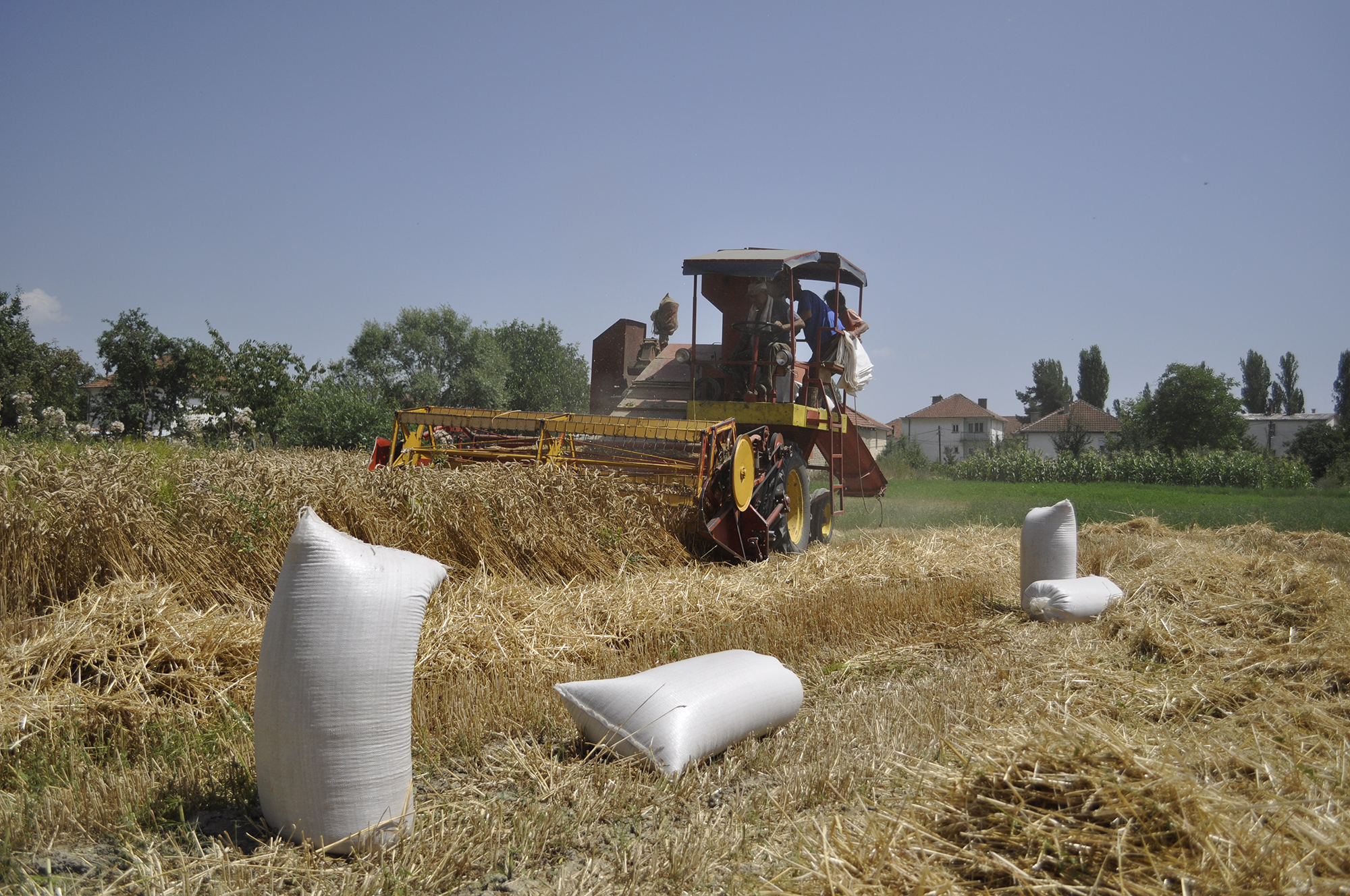 Жетва во Драслајца